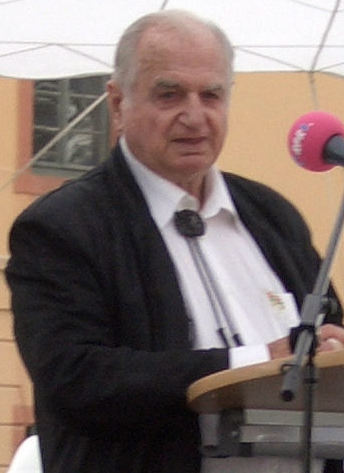 Hans Riegel junior bei der Eröffnung der Haribo-Ausstellung auf der Festung Ehrenbreitstein in Koblenz